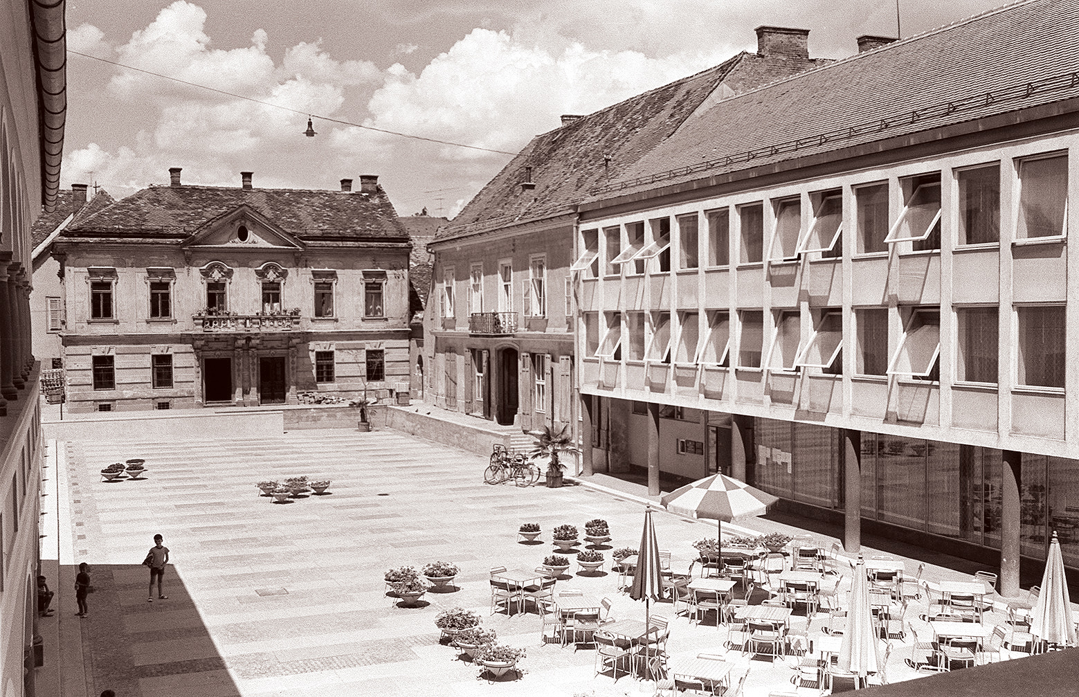 Rotovški trg